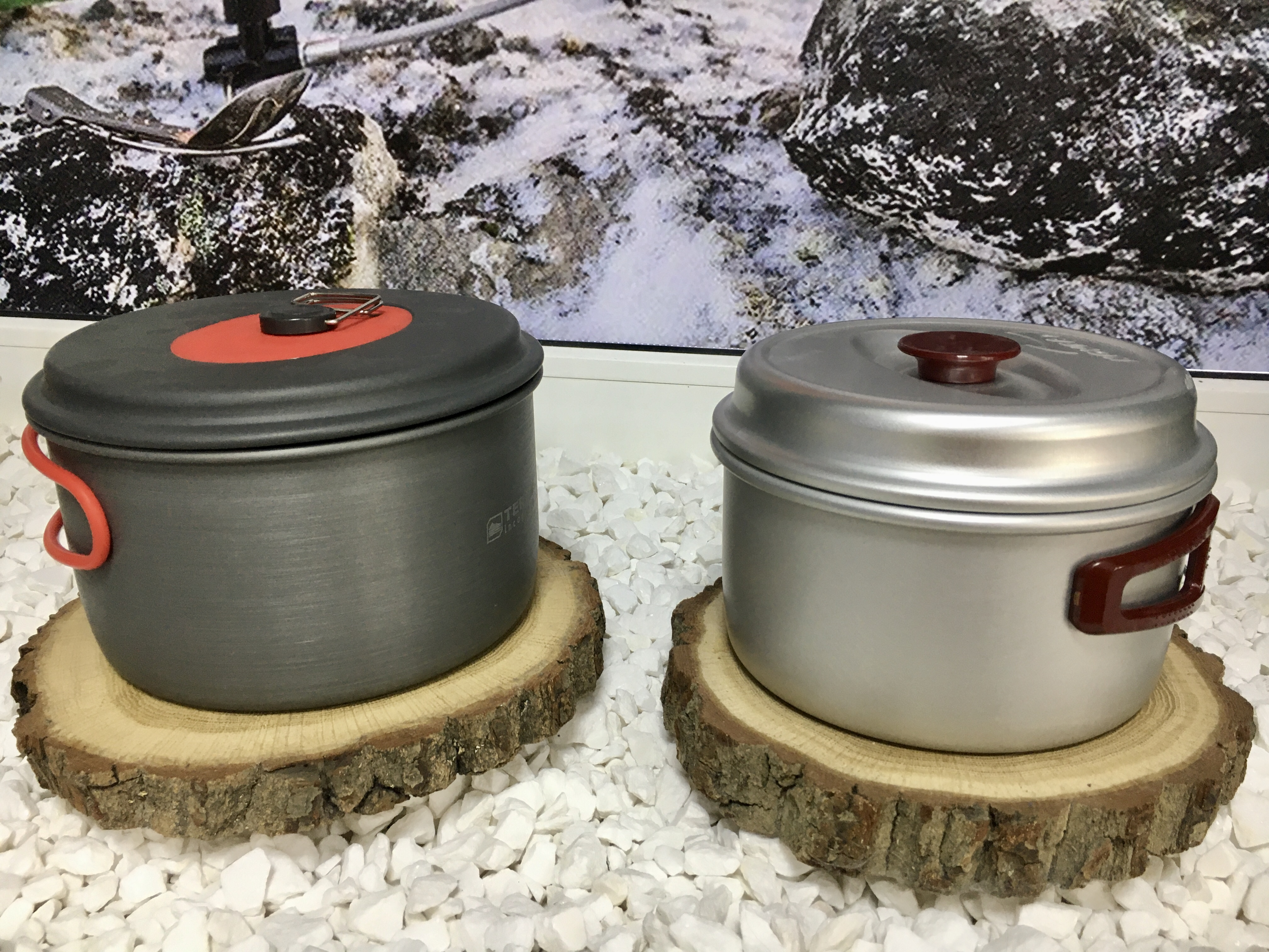 Казанки з анодованого (ліворуч) та звичайного алюмінію (праворуч)